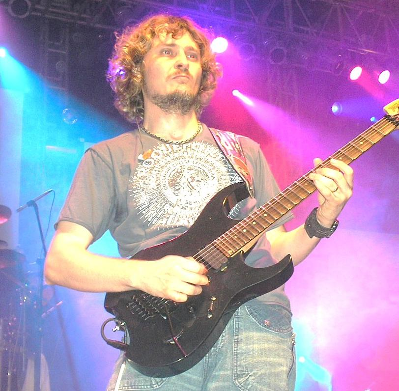 Juninho Afram num show do Oficina G3, em Vitória